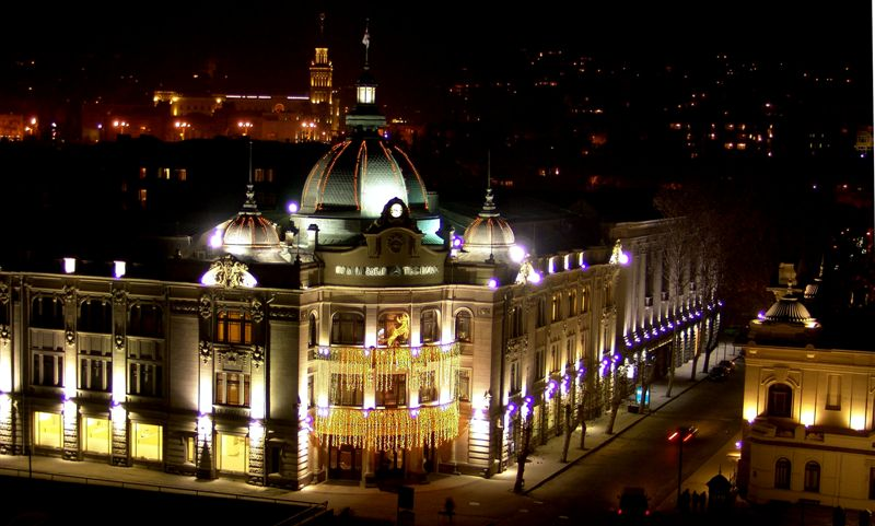 TBC Bank